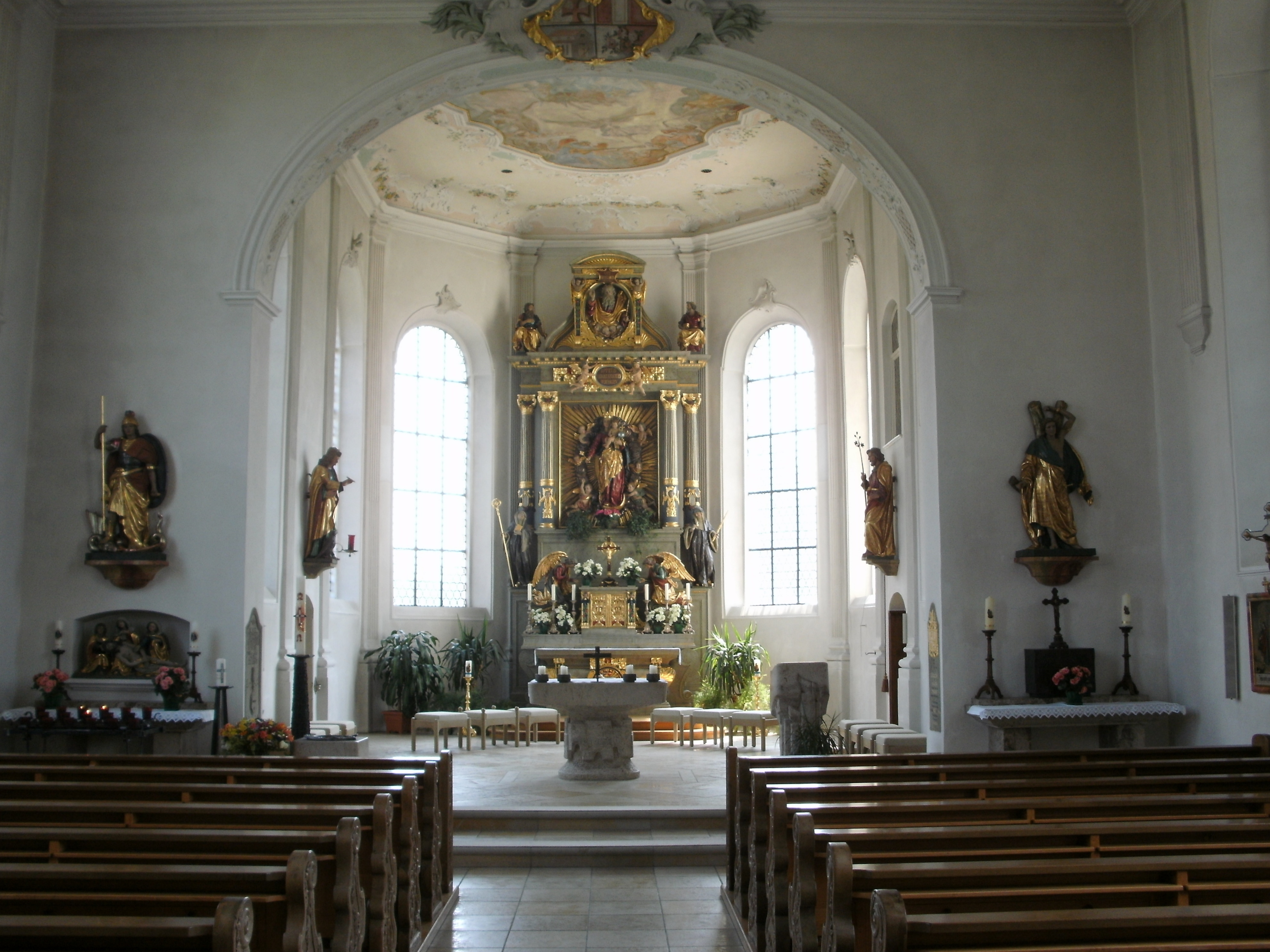 St. Georg und Sebastian(Niederkirch), neubarocker Hochaltar von Theodor Schnell d. J., 1904